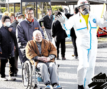 Beberapa anggota perubatan mengangkat seorang lelaki dipercayai terkena radiasi di bandar Nihonmatsu, Fukushima, Jepun.